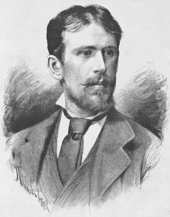 Portréty osobností od Jana Vilímka